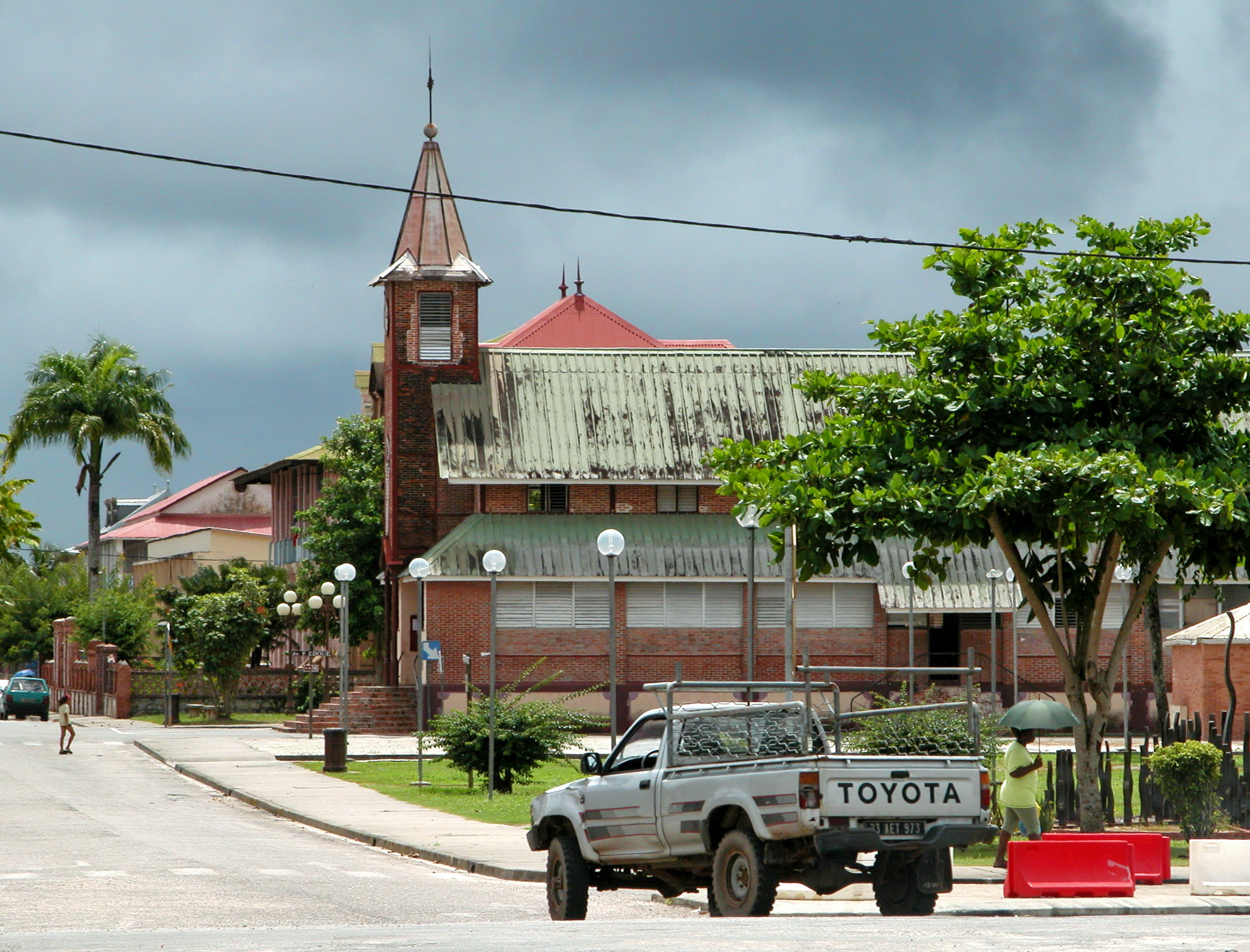 Église Saint-Laurent de Saint-Laurent-du-Maroni, Avenue du Colonel-Chandon (Inscrit, 1995) .